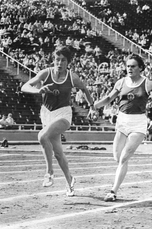 Leipzig, Turn- und Sporttreffen, Staffellauf Zentralbild Leipzig (Wlocka) Ho. 22.7.1957 Turn- und Sporttreffen der Jugend in Leipzig. 3 x 100 m Staffel. Wechsel zwischen Köhler und Mayer.